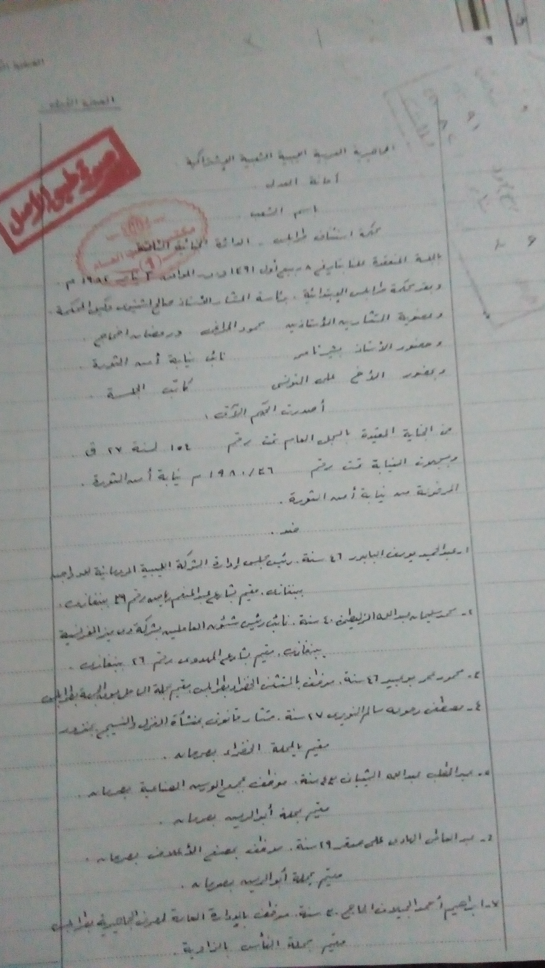 مذكرة اعتقال أعضاء حزب البعث في ليبيا